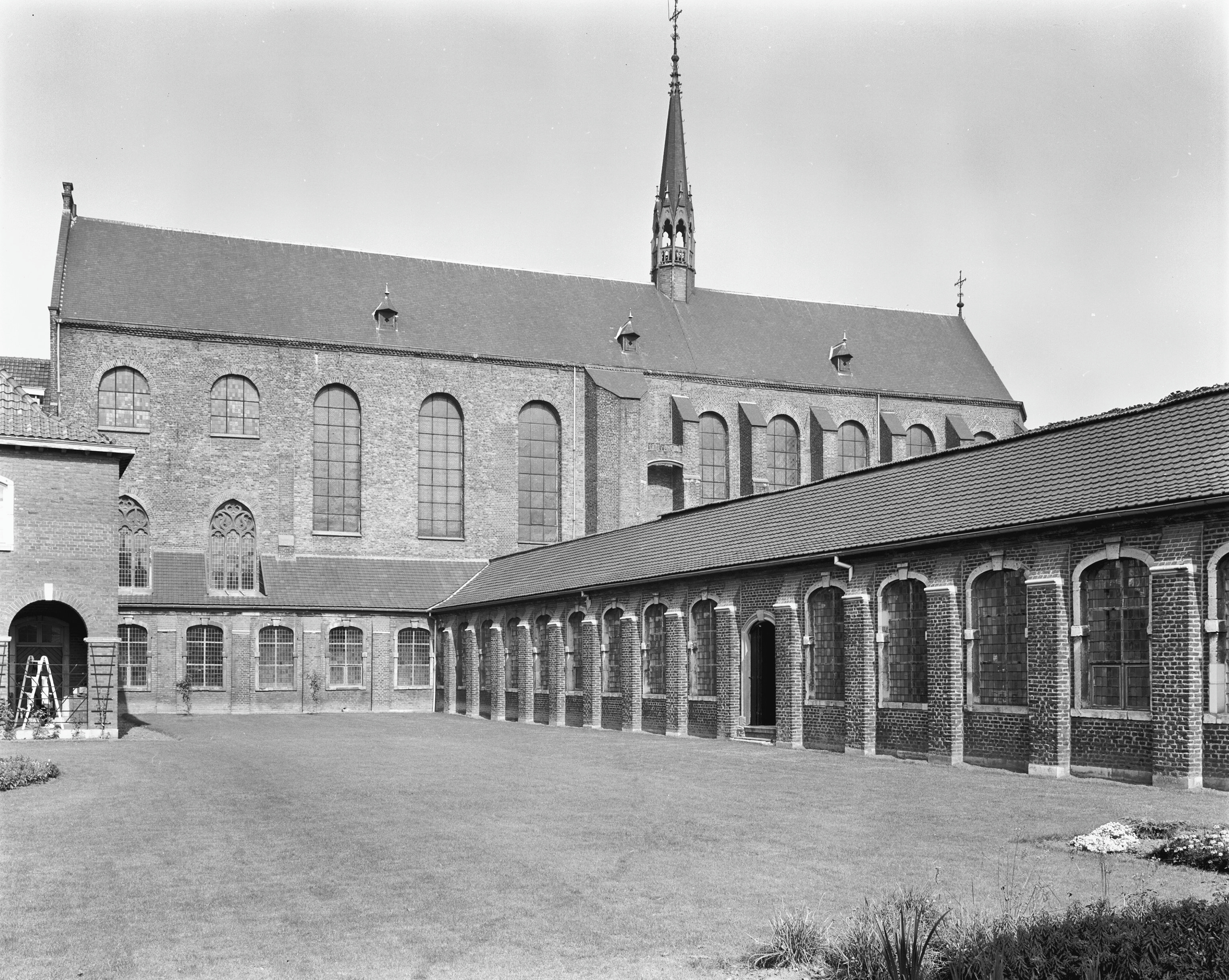 Groot Seminarie: kloostergang met kapel